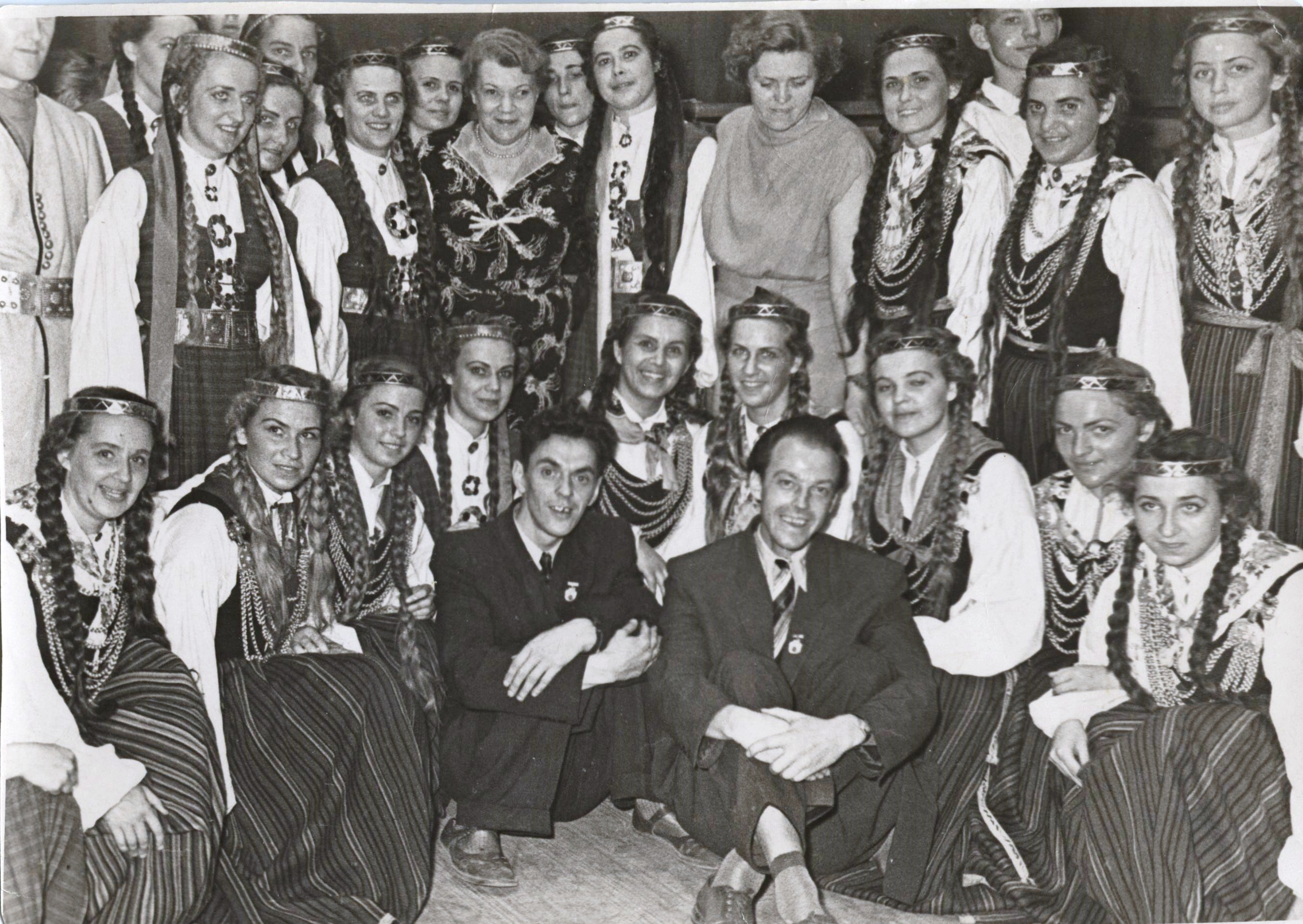 "Ventspils Strādnieku kluba lībiešu un ventiņu dziesmu un deju ansamblis" Maskavā. Foto no Mažānes mājas arhīva.